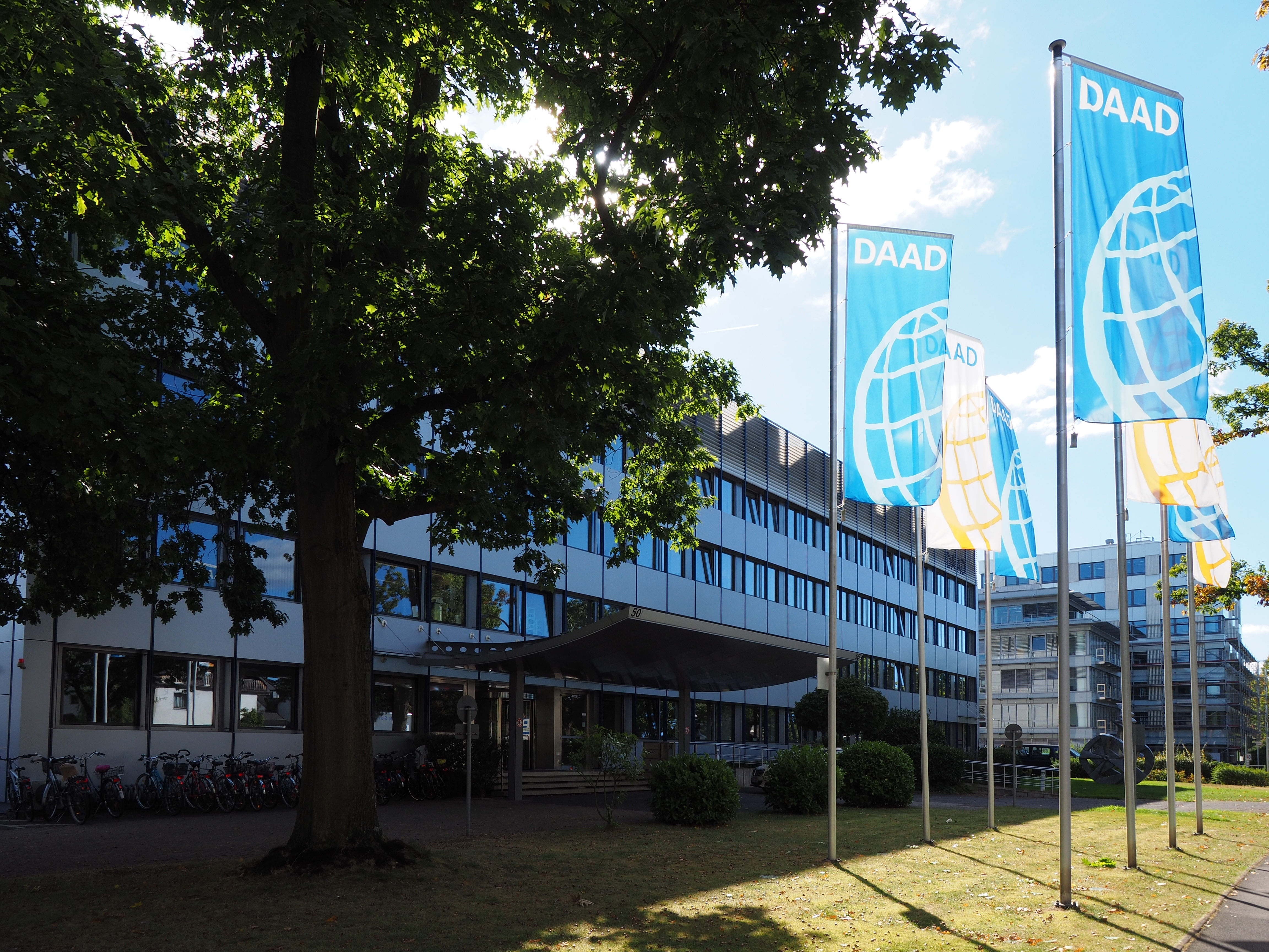 DAAD Haupthaus in Bonn mit aktuellen Fahnen (2017)